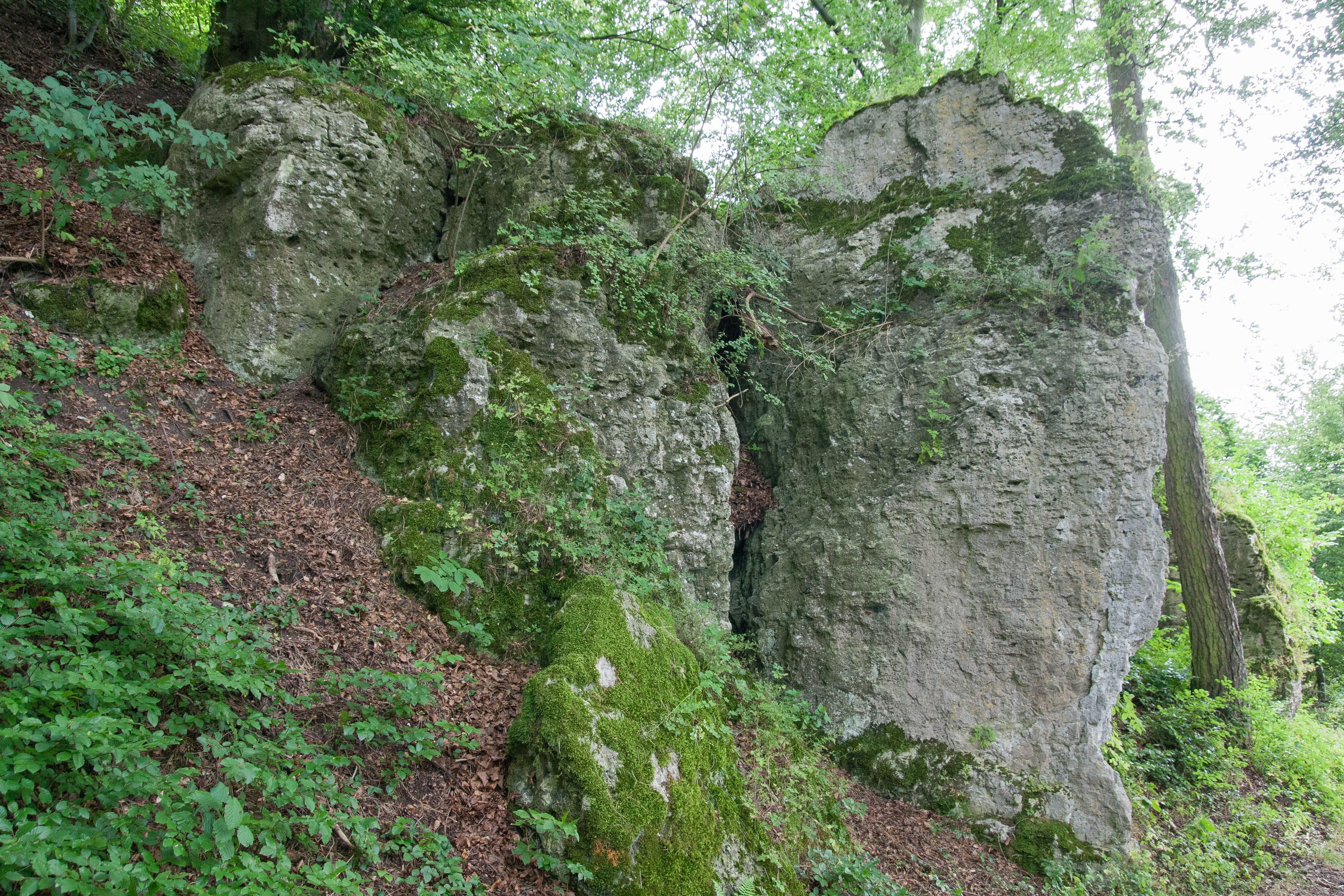 Landschaftsschutzgebiet bei Velburg, Geotop, Velburg Burgfelsen